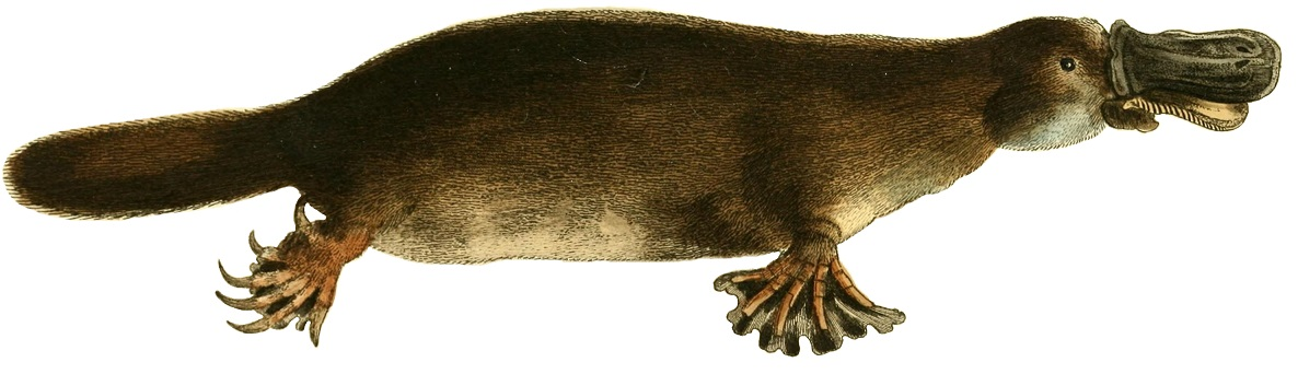 2V